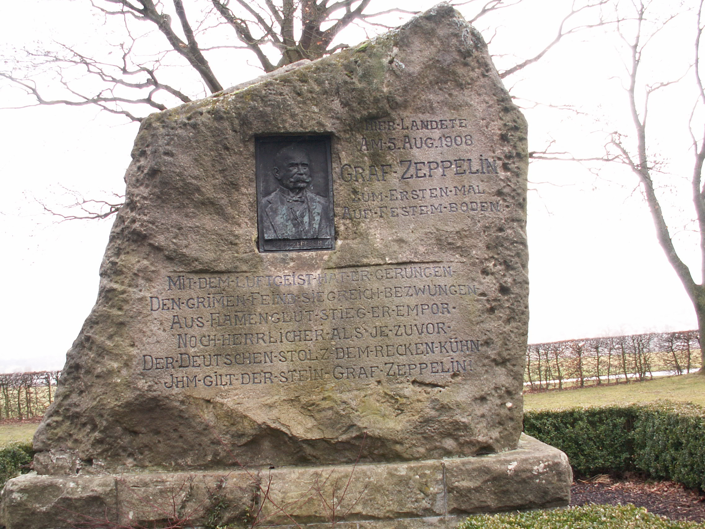 Gedenkstein Zeppelinstein in Echterdingen